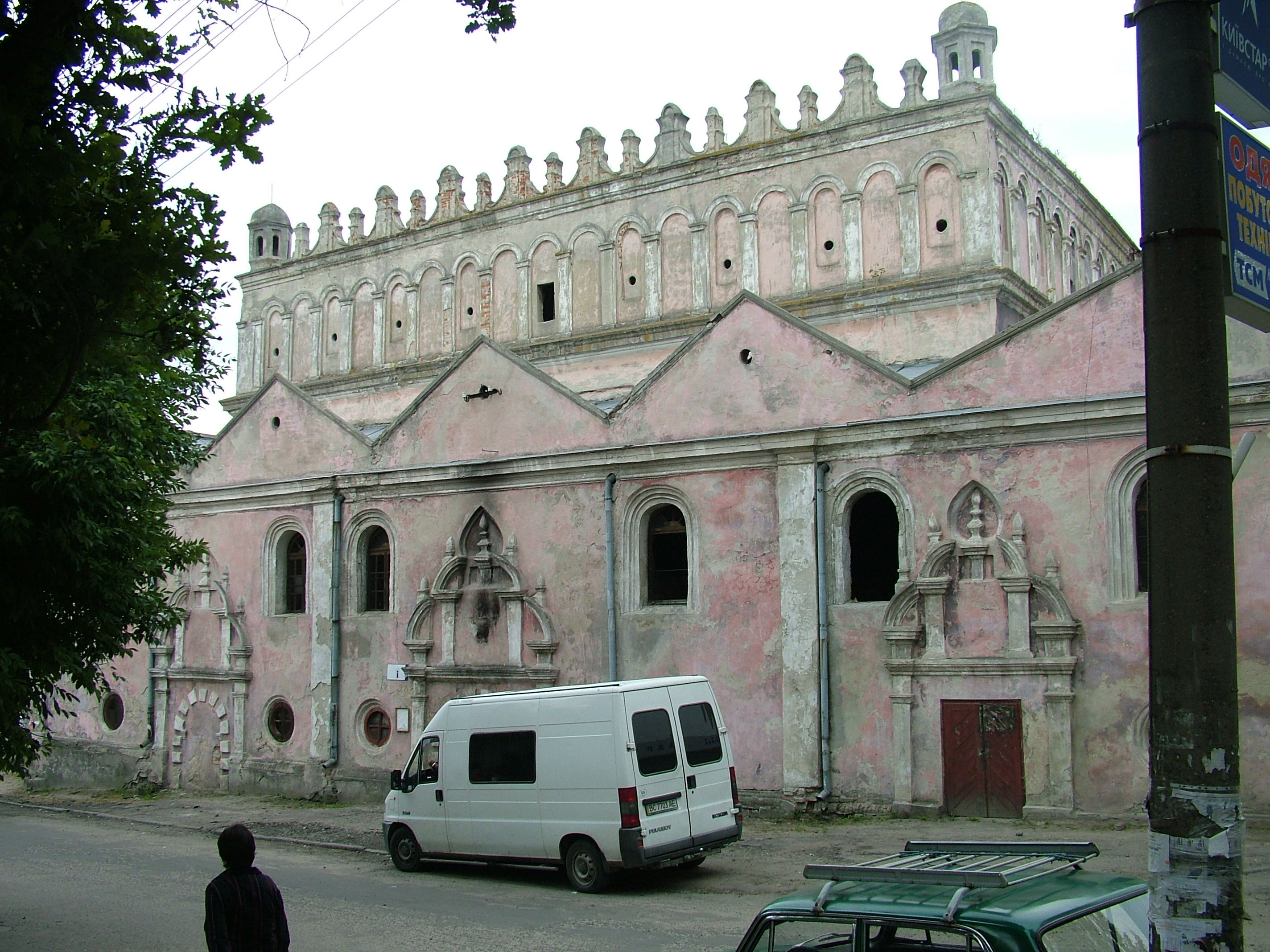 Synagoga w Żółkwi